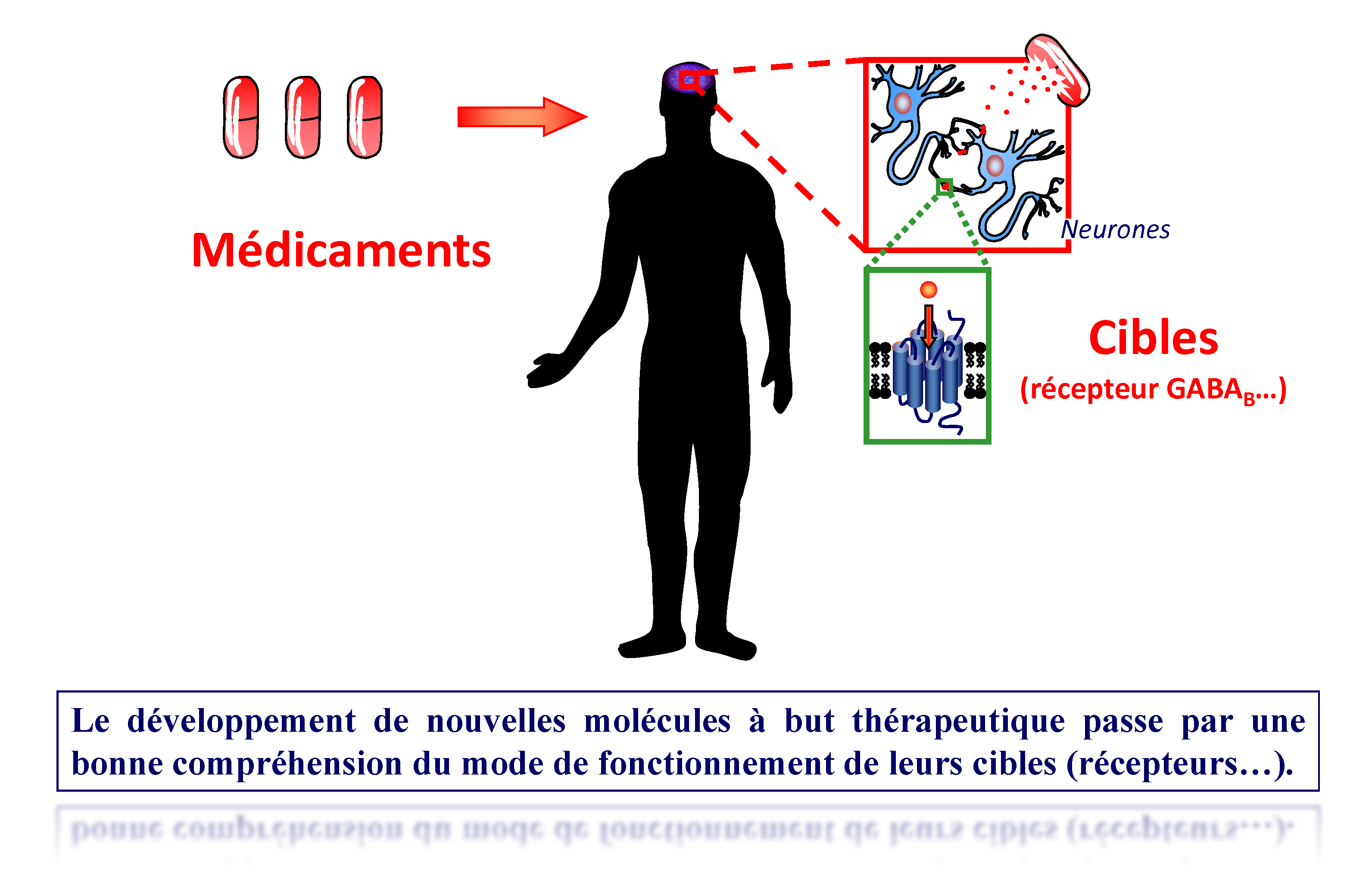 Les RCPG comme cibles thérapeutiques